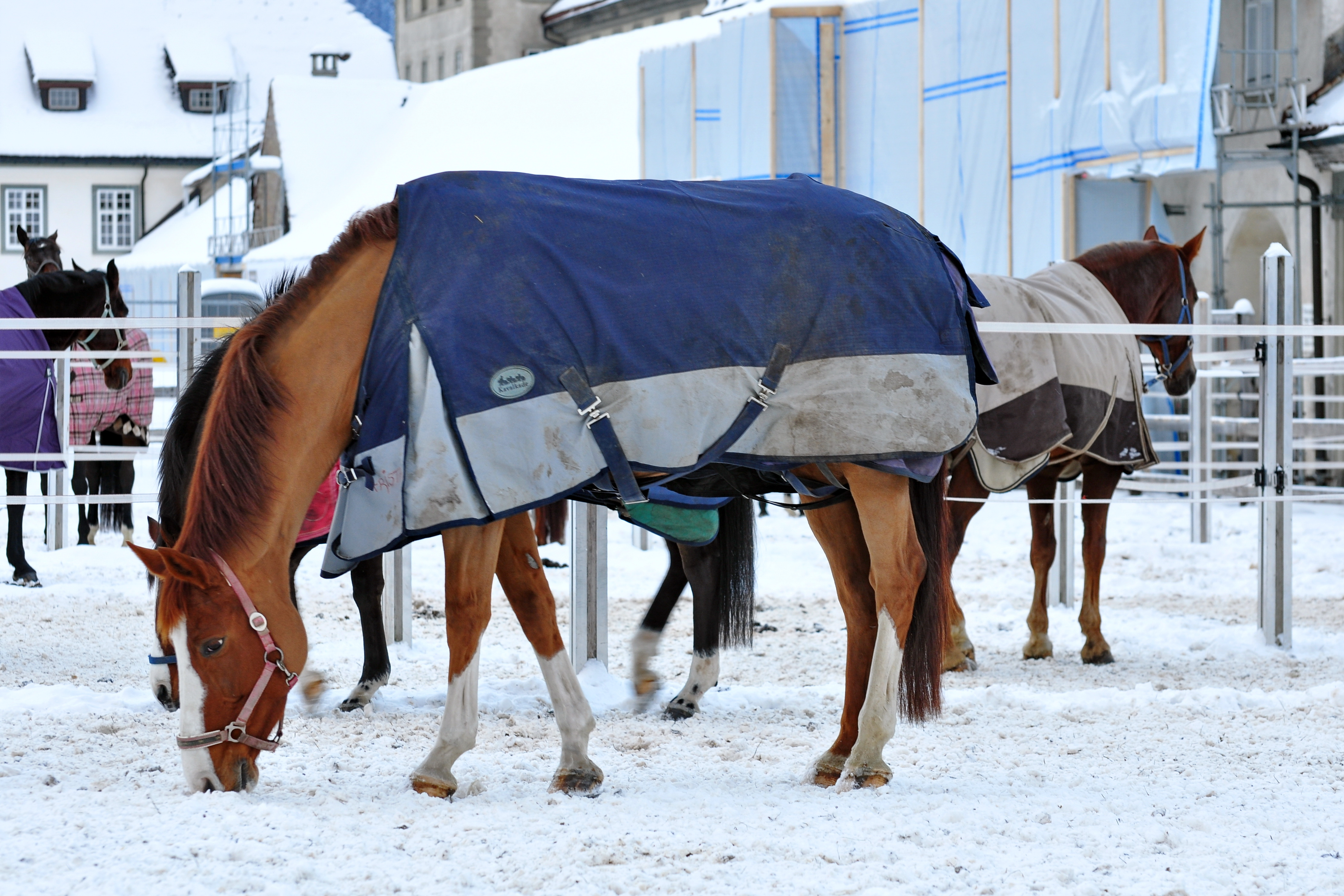 Marstall in Einsiedeln (Switzerland)